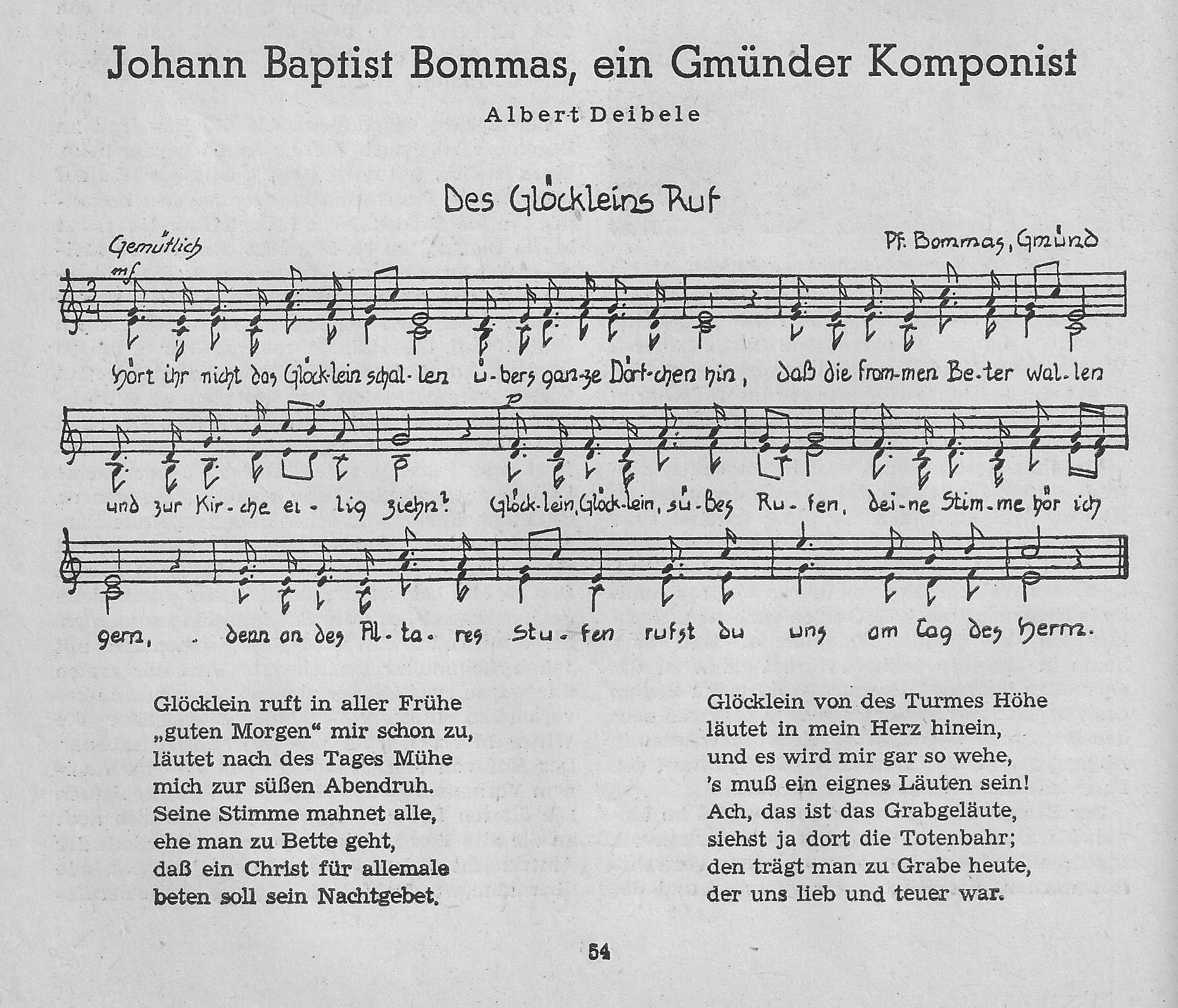 Beginn von Albert Deibele: Johann Baptist Bommas, ein Gmünder Komponist